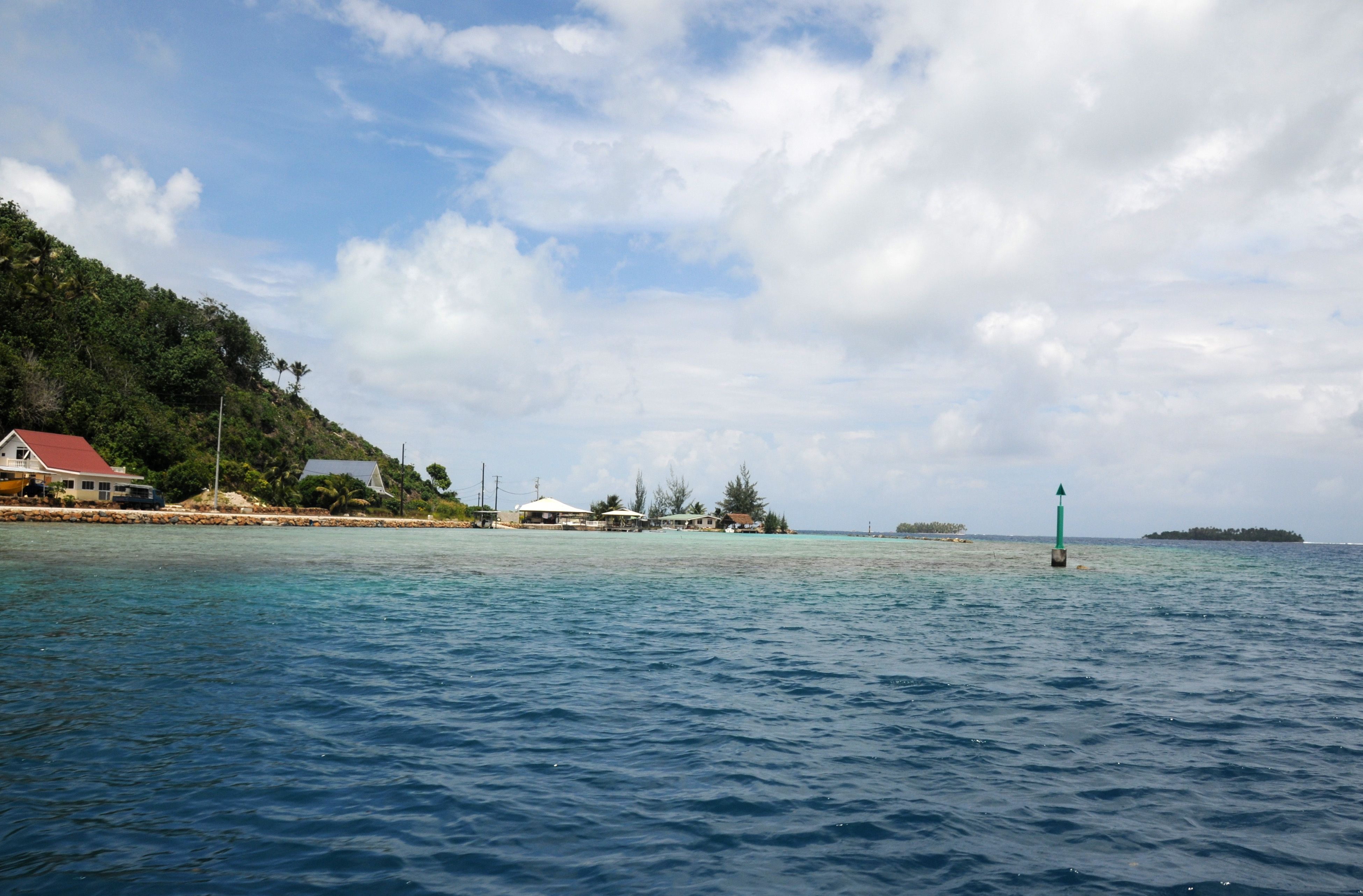 Hibiscus - Taha'a - Ha'amene Bay